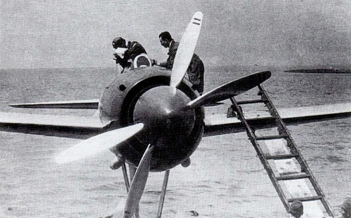 N1K1 prototype